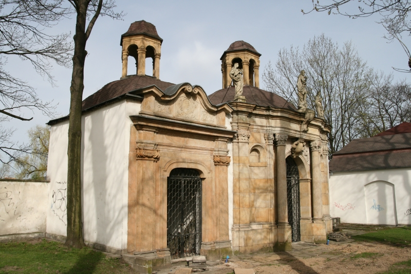 Grufthäuser Nr. 1 (Fam. Glogner) und Nr. 2 (Fam. Glafey) auf dem Gnadenkirchhof in Jelenia Góra (2011)